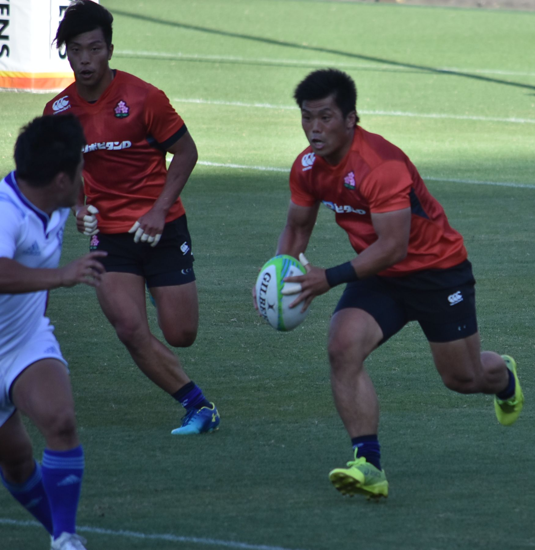 坂井 克行